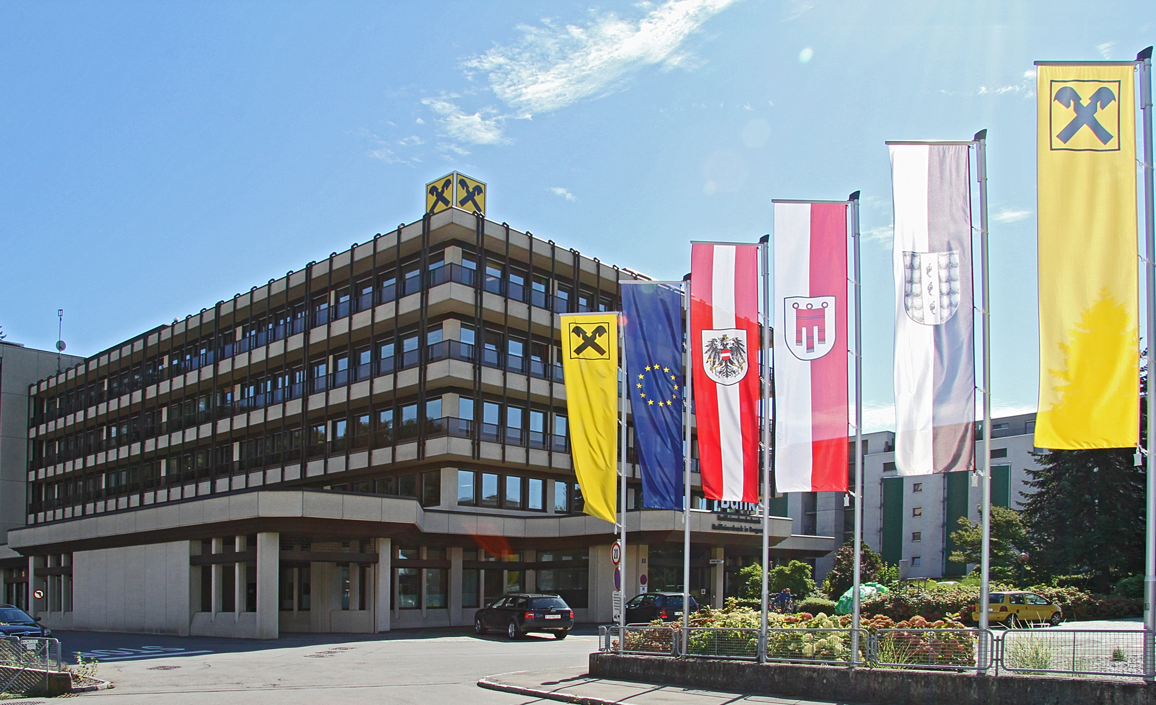 Bild der Raiffeisenlandesbank Vorarlberg mit Sitz in Bregenz, Rheinstraße 11, 6900 Bregenz.